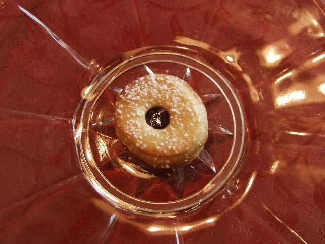 Linzer Auge mit 1 Aug